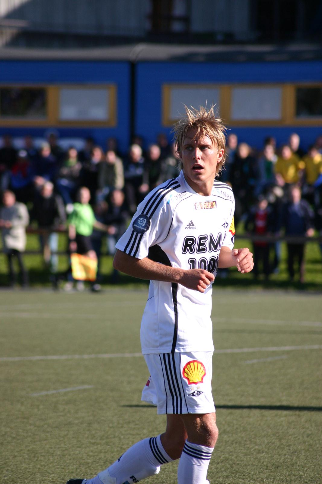 Norsk (bokmål): Bilde av Per Ciljan Skjelbred i treningskamp mot Strindheim.